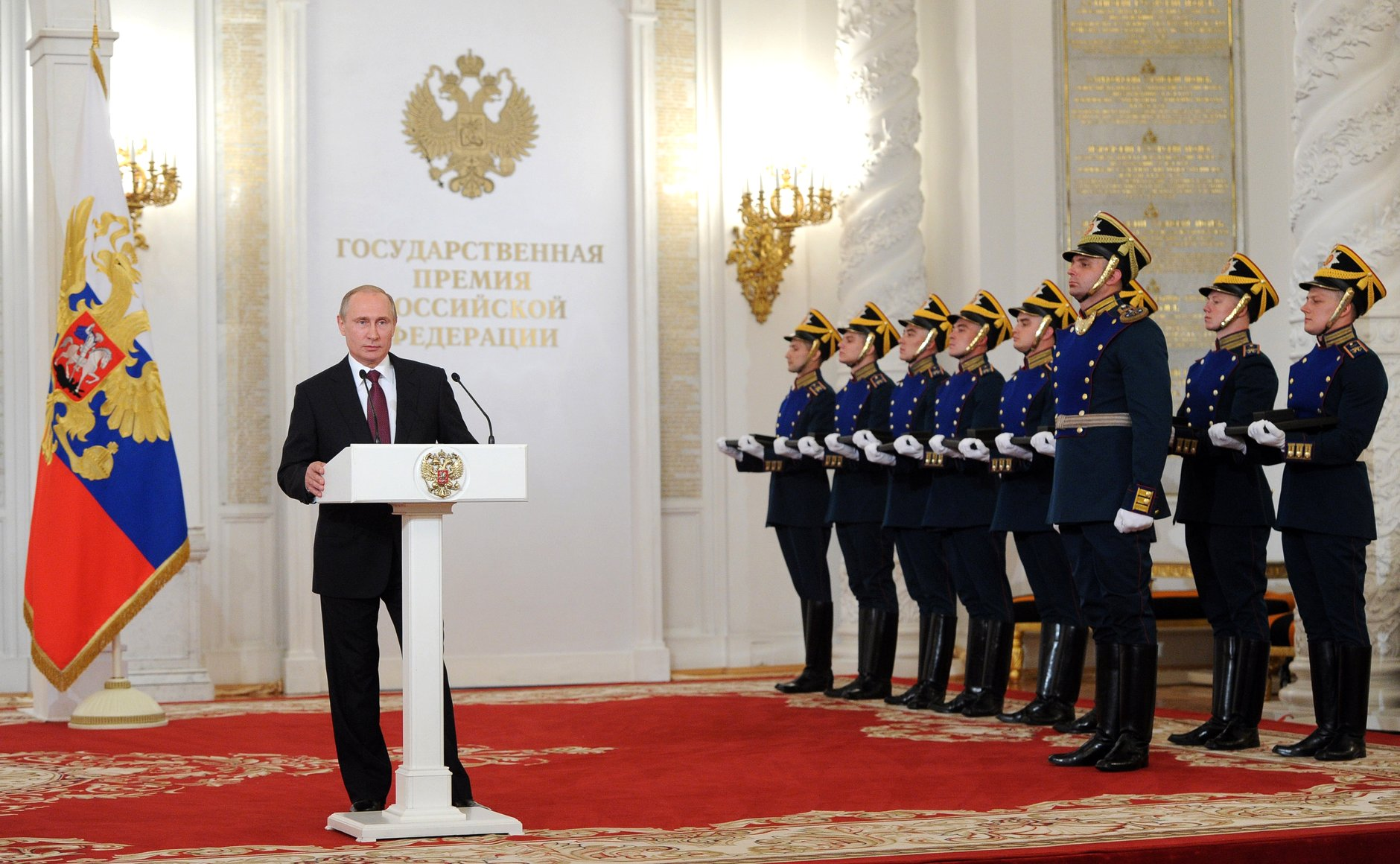 Вручение Государственных премий Российской Федерации за 2015 год